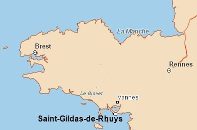 Karta över Saint Gildas de Rhuys. Karta:Jory eldberg.